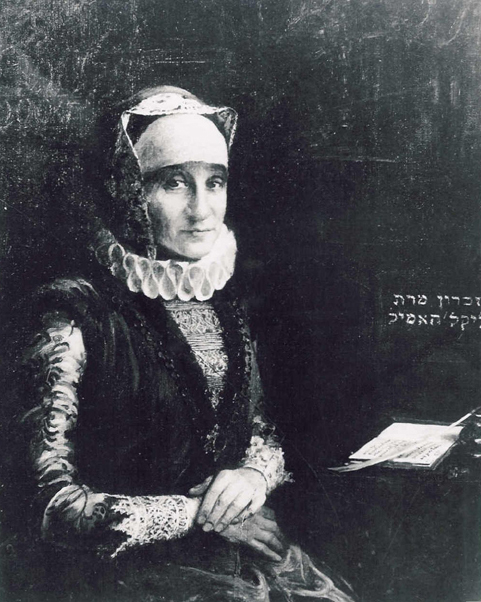 Bertha Pappenheim (1859-1936) im Kostüm der Glikl bas Judah Leib. Das Original des Bildes ist verschollen. Reproduktionen sind enthalten im ersten Kalender des Jüdischer Frauenbund (1925) und in den Blättern des Jüdischen Frauenbundes (Ausgabe 4. April 1932). Zu beachten sind die schönen Spitzenmanschetten: Bertha Pappenheim war bekannt als Sammlerin schöner Handarbeit, insbesondere von Spitzen. Der Text im Hintergrund lautet in Umschrift: Zikron marat Gliql Hamil (jiddischer Titel der Erinnerungen der Glikl von Hameln, die Bertha Pappenheim übersetzt hatte).